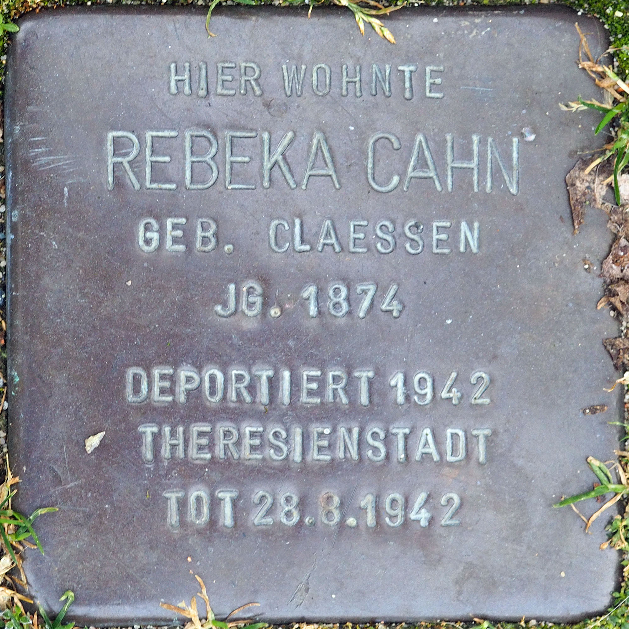 Stolpersteine MG: Cahn, Rebeka